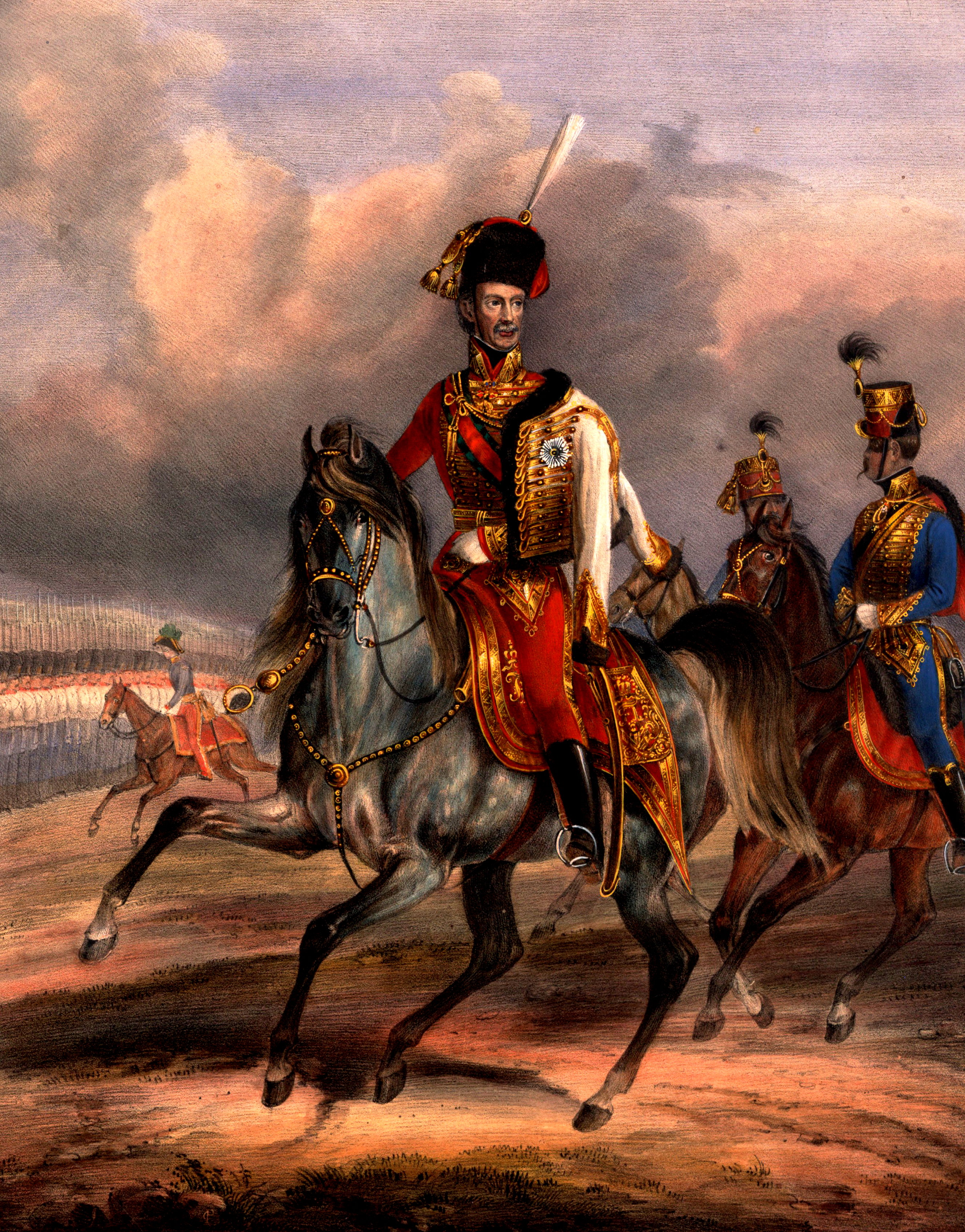 Habsburg József nádor (Erzherzog Joseph Anton Johann Baptist von Österreich; (Firenze, 1776. március 9. – Buda, 1847. január 13.), német-római császári herceg, osztrák főherceg, magyar királyi herceg, császári-királyi tábornagy (k.k. Generalfeldmarschall), 1796-tól haláláig Magyarország nádora, a Habsburg-ház ún. magyar vagy nádori ágának megalapítója.